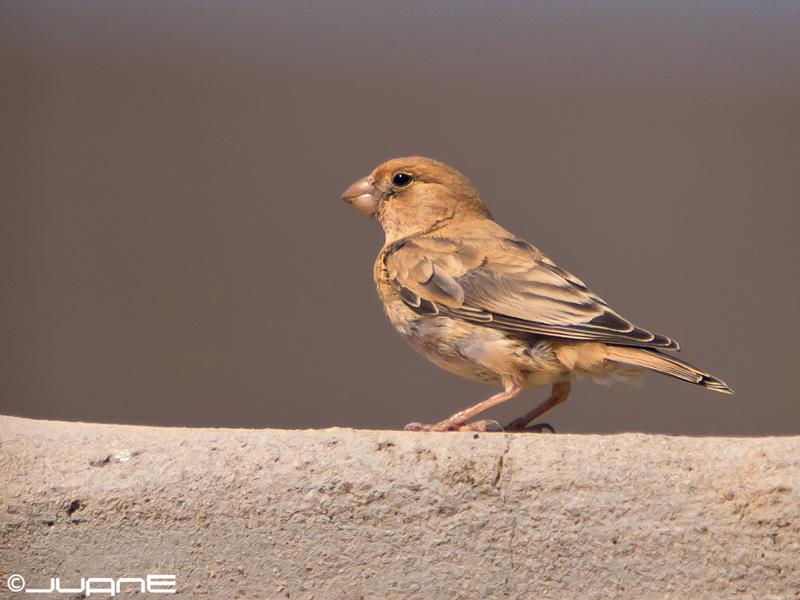 Camachuelo trompetero (Bucanetes githagineus amantum)